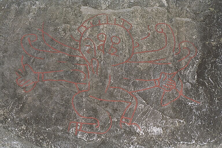 Blocket är ristat på tre sidor. På en sida finns en slinga med runor. Inskriften har inte kunnat tolkas och är förmodligen utförd av en inte oskicklig ristare. På de båda andra sidorna finns ett kors och en mansfigur. Motiv: Sö324 Åsby Nyckelord: Runor Kategori: Runristning/runsten Blocket är ristat på tre sidor. På en sida finns en slinga med runor. Inskriften har inte kunnat tolkas och är förmodligen utförd av en inte oskicklig ristare. På de båda andra sidorna finns ett kors och en mansfigur.